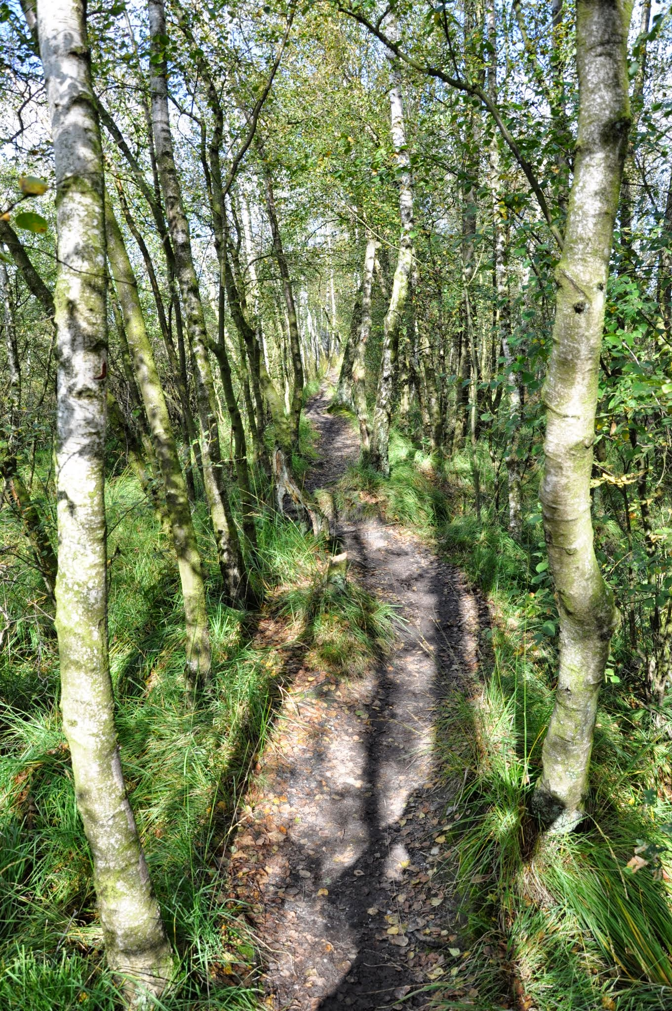 wat een vogels hier...